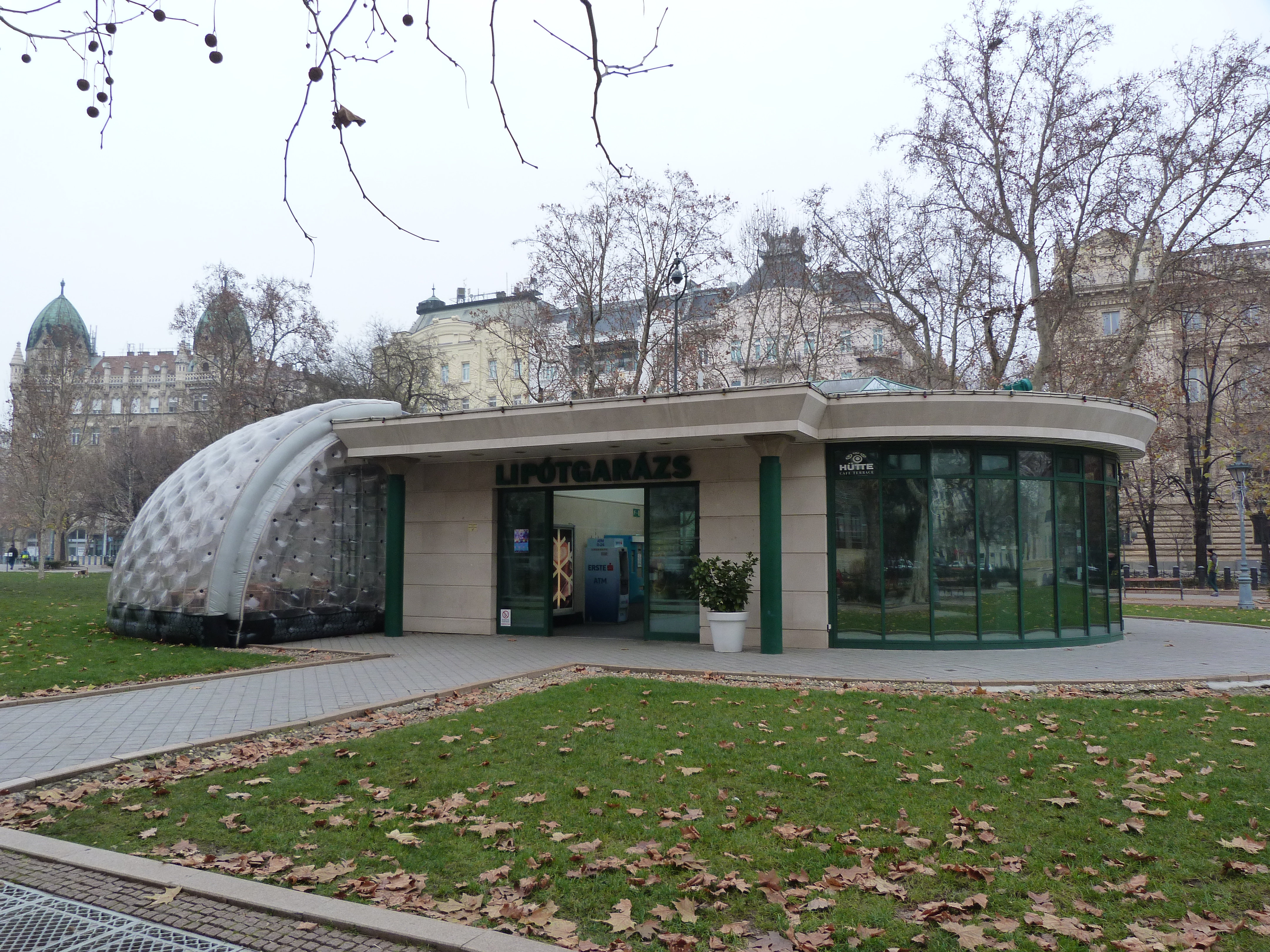 A felvétel 2014. december 14-én készült. Budapesti Unitárius Egyházközség, Belváros. Nagy Ignác utca 2-4 szám. ©© Derzsi Elekes Andor, Budapest, 2014, A kép egészben, vagy részletekben másolását, bármilyen úton történő sokszorosítását és felhasználását a szerző ellenérték nélkül, jogutódjaira is kihatóan megengedi. Az engedély kiterjed a kereskedelmi célú hasznosításra is. Kéri azonban nevének feltüntetését a felhasználás során. A Metapolisz sorozat valamennyi képe és filmje Creative Commons alatti valamint kereskedelmi - for profit - célra is felhasználható. Ajánlott hivatkozás: Derzsi Elekes Andor: Metapolisz DVD line